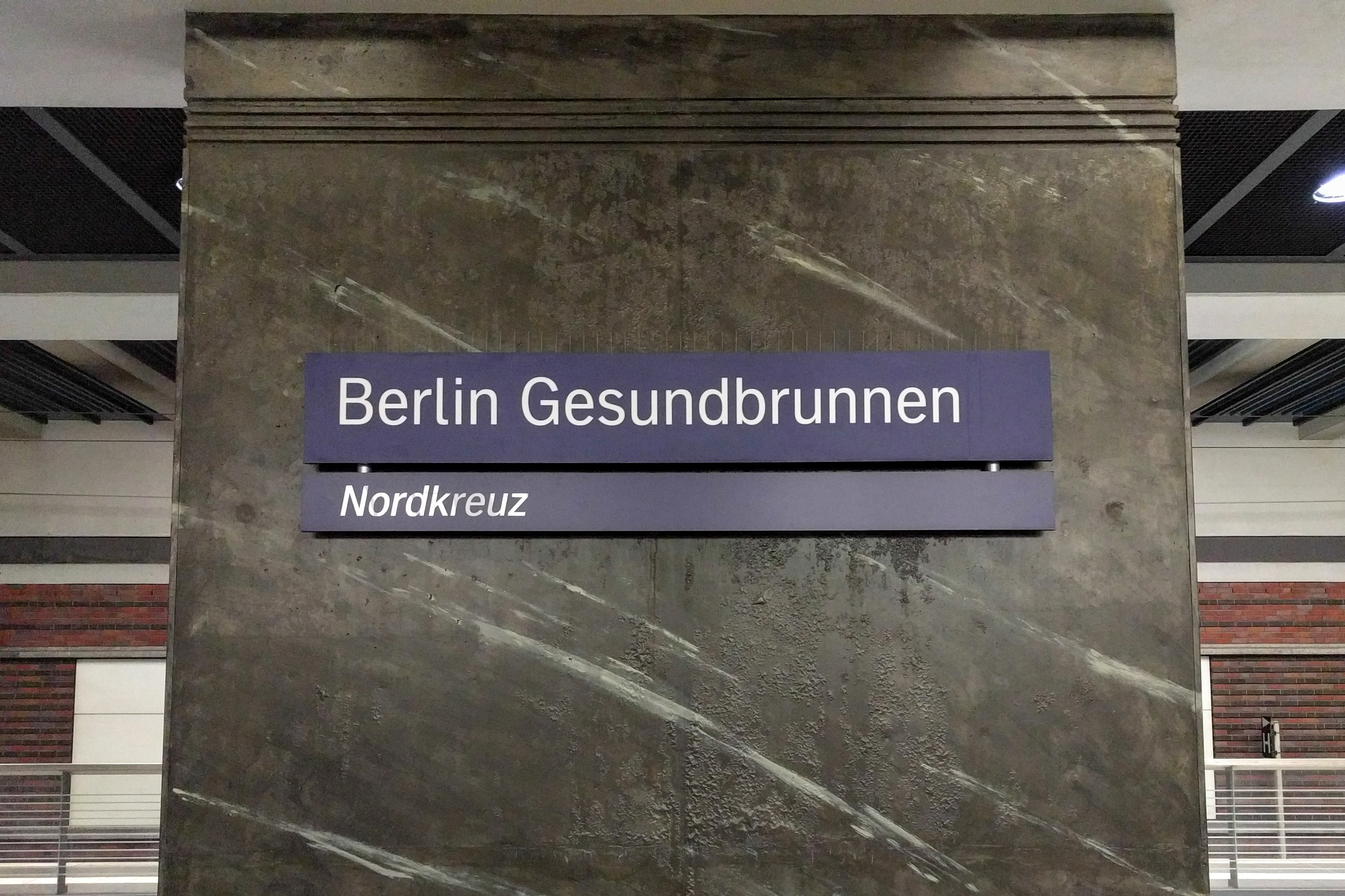 Stationsschild Berlin Gesundbrunnen / Nordkreuz am Nah- und Fernverkaufsbahnhof Berlin Gesundbrunnen. Die neuen Schilder mit neuem Zusatznamen wurden im Juni 2016 enthüllt.